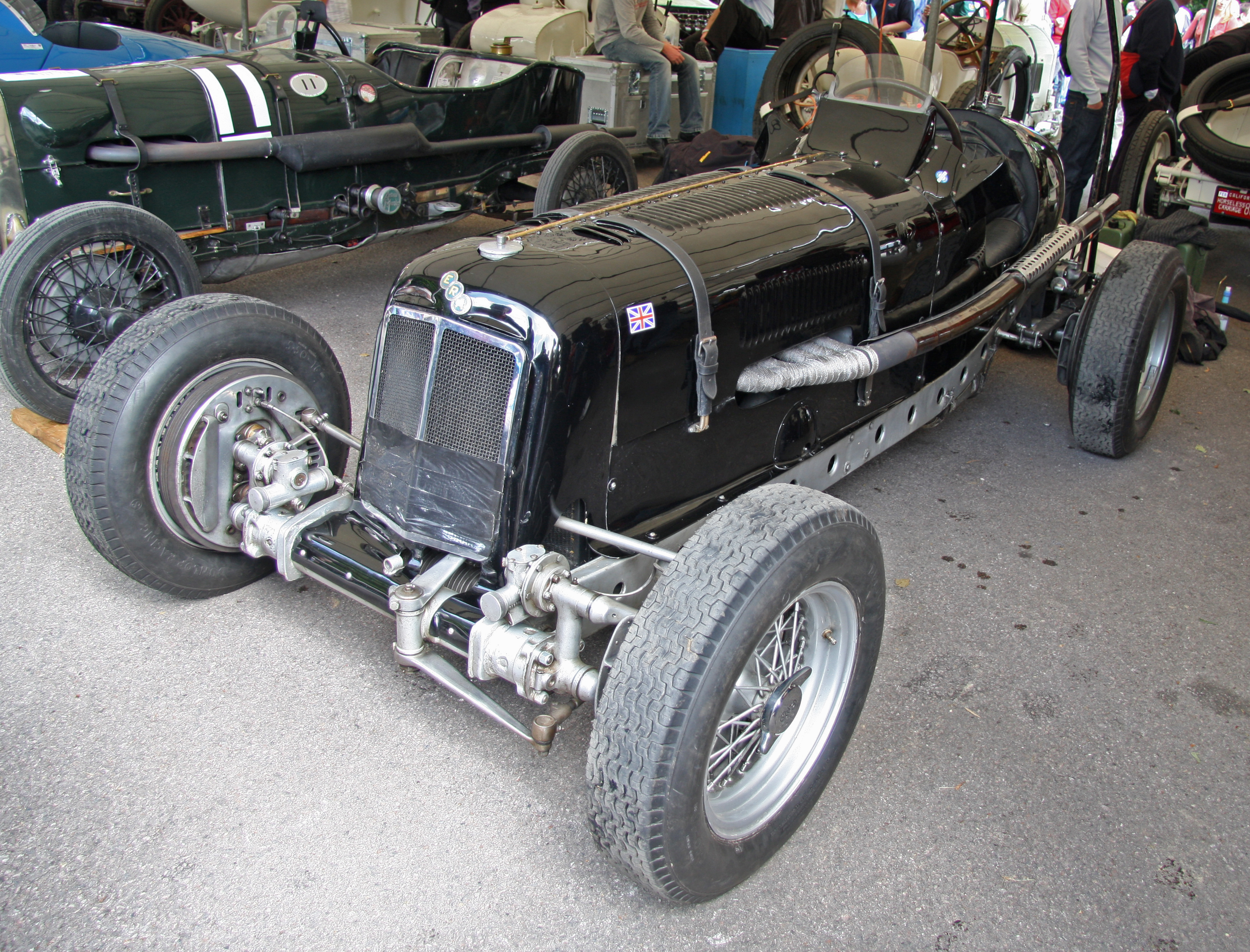 Built 1935. 3 litre 8 cylinder